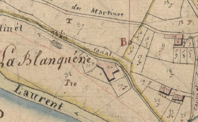 La Blanqueria de Sant Llorenç de Cerdans en el Cadastre napoleònic del 1812 (Arxius Departamentals dels Pirineus Orientals)